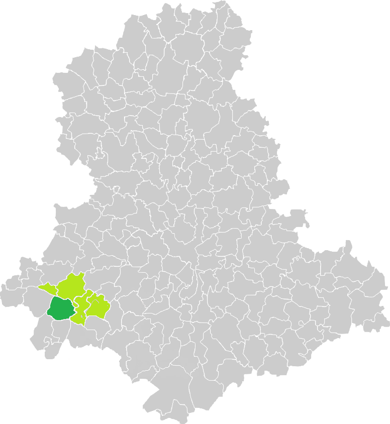 Carte de situation de la commune de Cussac (en vert foncé) dans le votre Canton (en vert clair) sur une carte des communes de la Haute-Vienne